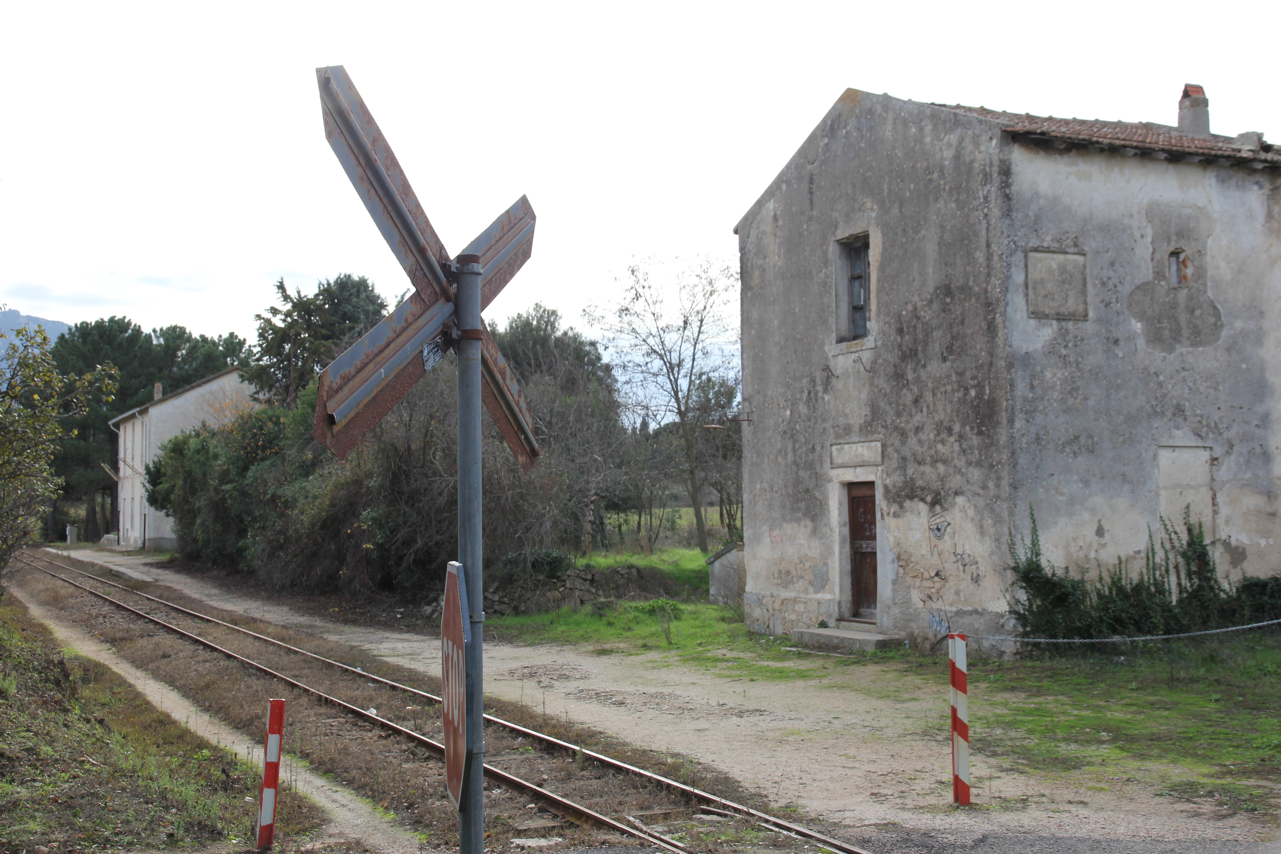 Stazione ferroviaria di Nuchis